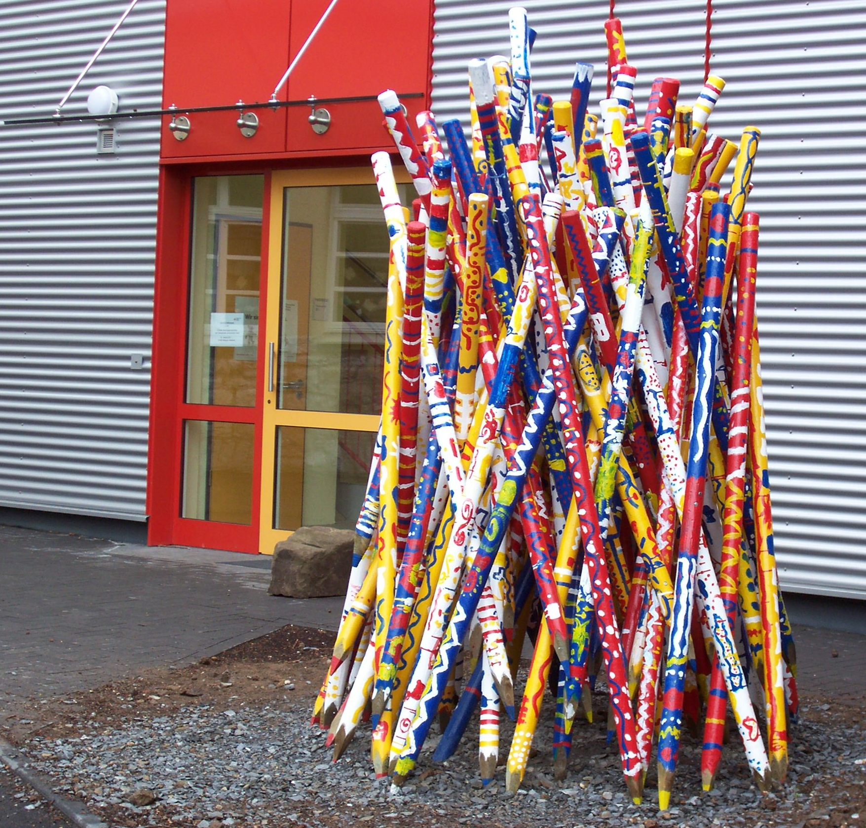 Skulptur 'Riesenbuntstifte' des Künstlers Fritz Pietz vor der OGaTA Bergisch Gladbach-Hand. Die Bemalung der einzelnen "Stifte" wurde von allen Schülern der KGS-Hand des Schuljahrs 2006/2007 während des "Buntstift-Projekt" im Juni 2007 vorgenommen.